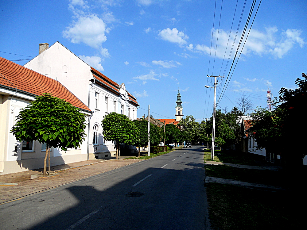 Glavna ulica i centar Bačkog petrovca